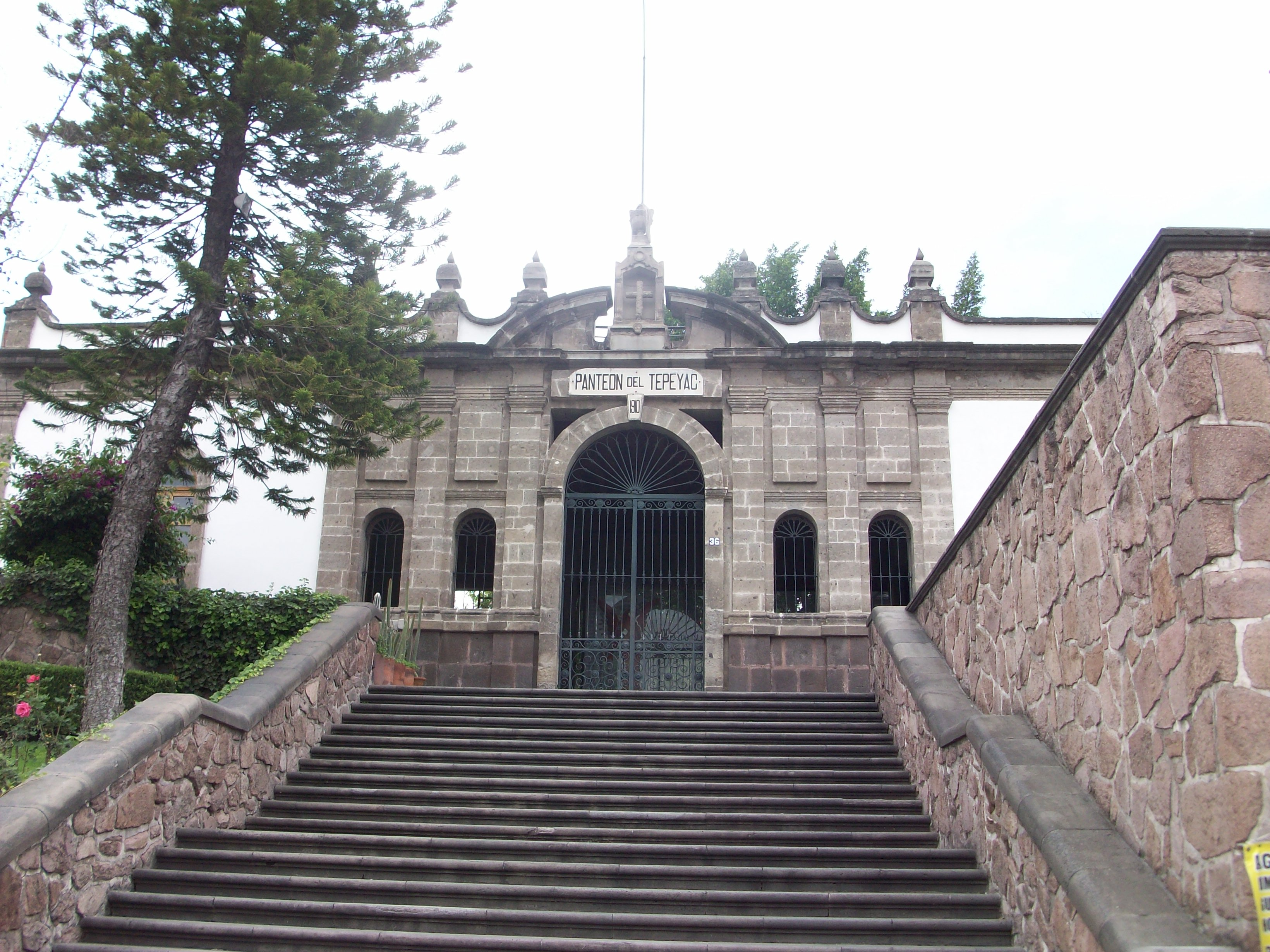 Fachada del Pnteon del Tepeyac